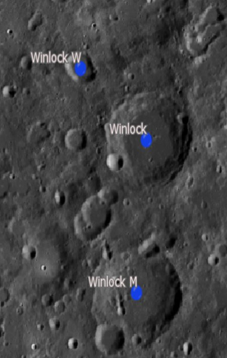 Cráter lunar Winlock. Cráteres satélite. (Imagen LRO)